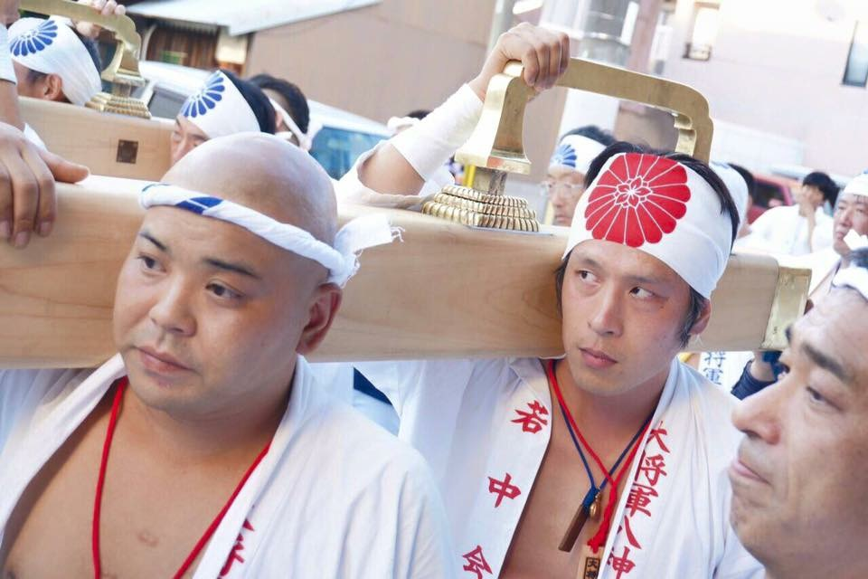 京都、大将軍八神社の神輿の鳴鐶を握る担ぎ手。